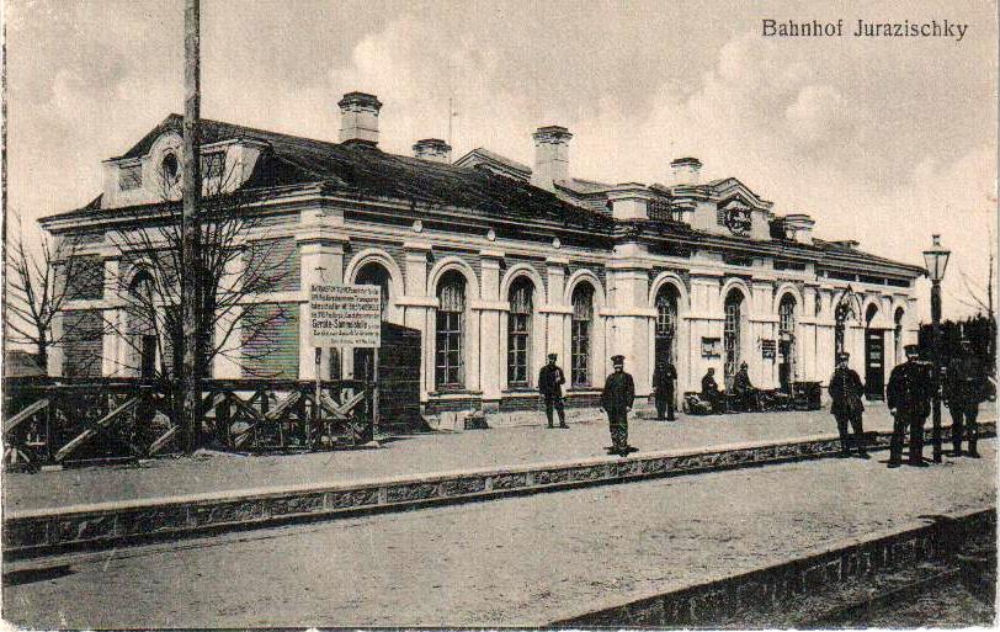 Беларуская (тарашкевіца): Юрацішкі (Juraciški). Чыгуначная станцыя